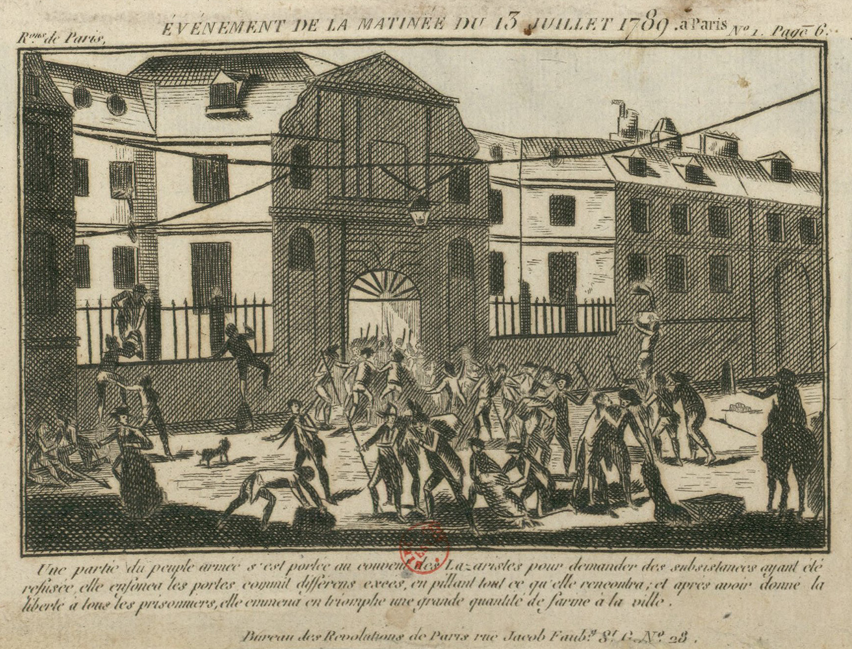 Evénement de la matinée du 13 juillet 1789 a Paris : une partie du peuple armée s'est portée au couvent des Lazaristes pour demander des subsistances, ayant êté refusée elle enfonca les portes,... : (estampe / non identifié) Bibliothèque nationale de France, département Estampes et photographie, RESERVE QB-370 (9)-FT 4